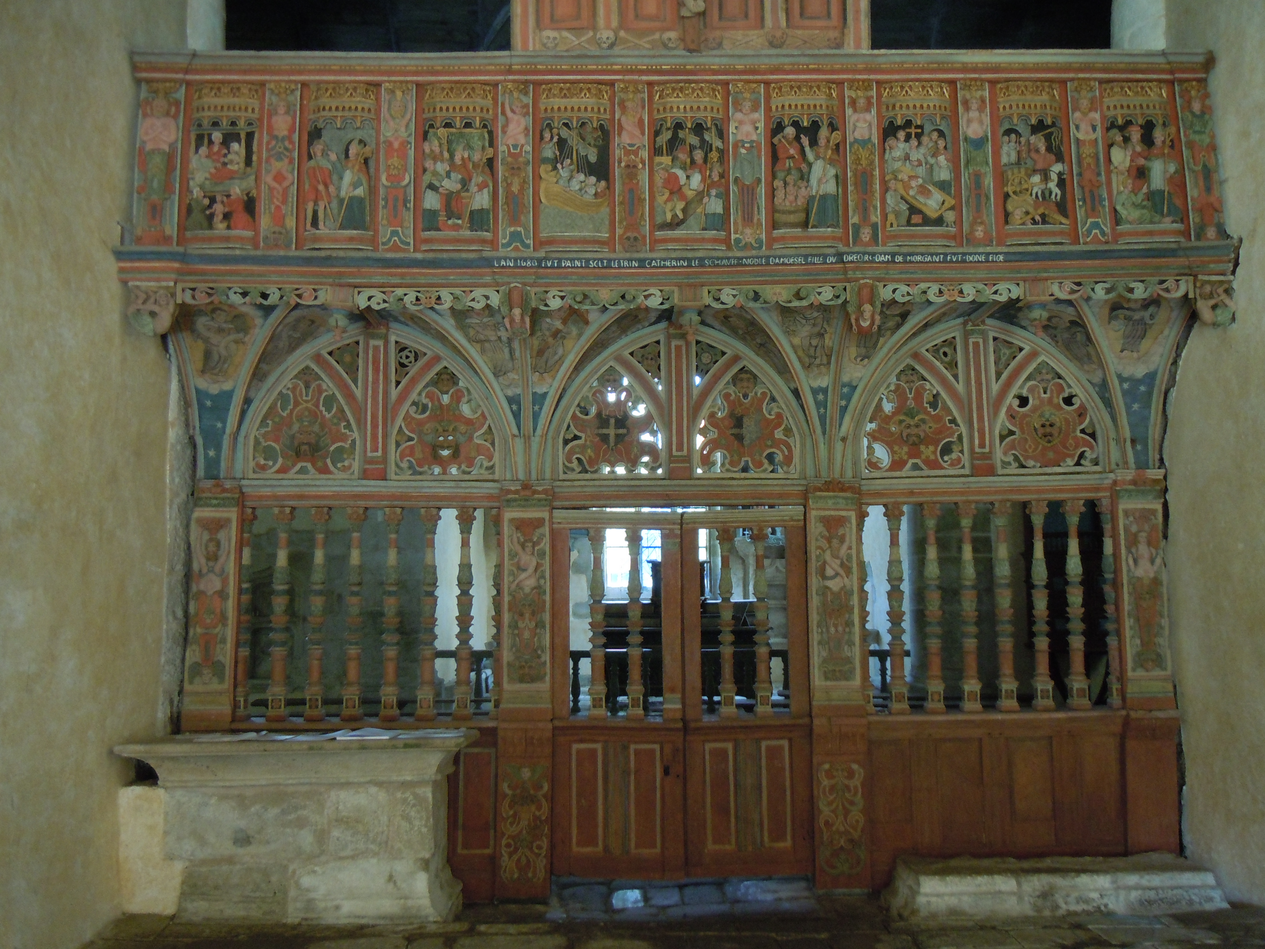 jubé de la chapelle Saint Nicolas, élévation ouest, commune de Priziac, département du Morbihan, France .